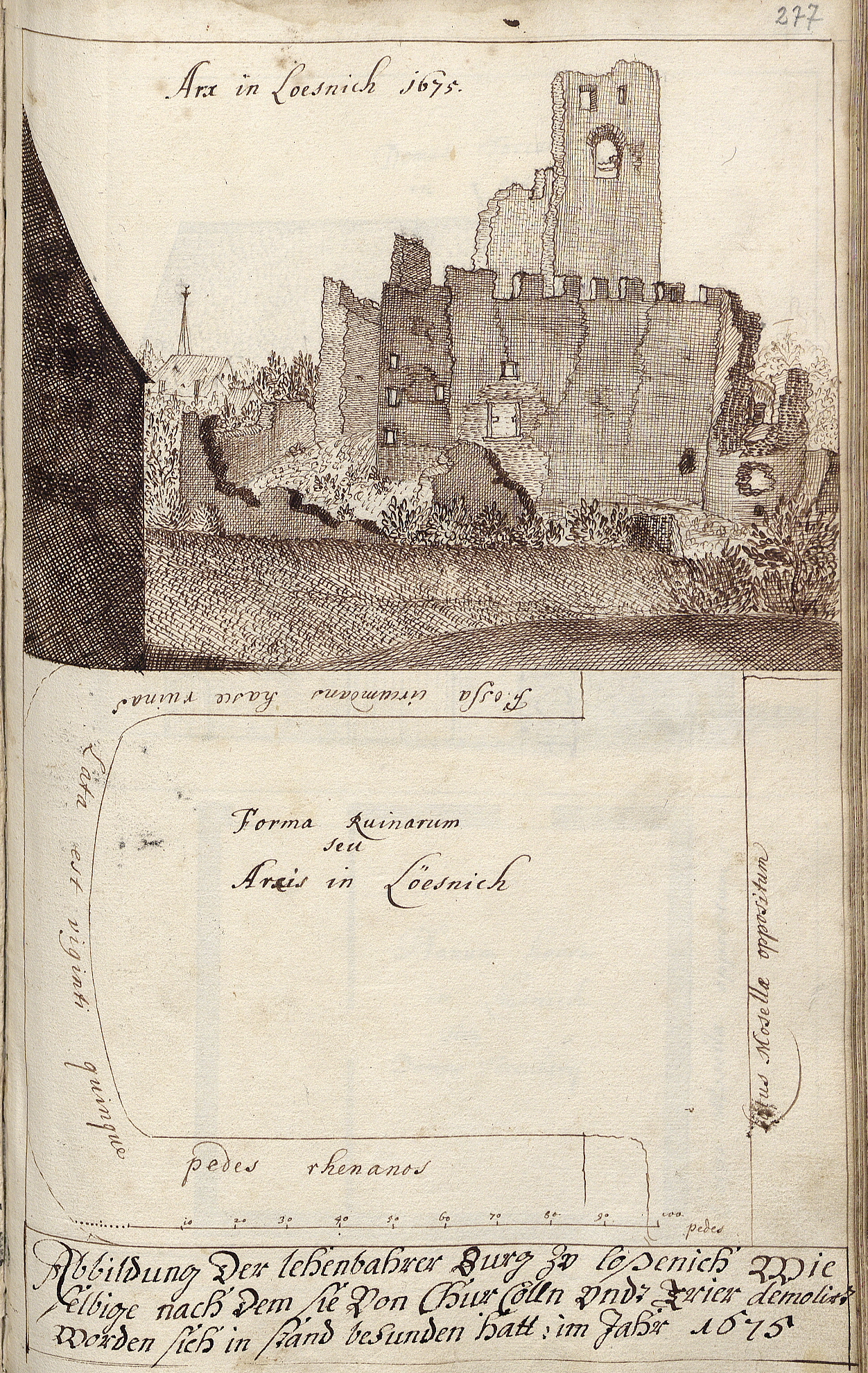 Zeitgenössiche Skizzierung der Burgruine Lösnich im Jahre 1675 mit Größenangaben